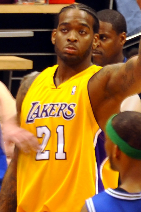 Lakers@Wolves_201004_0088